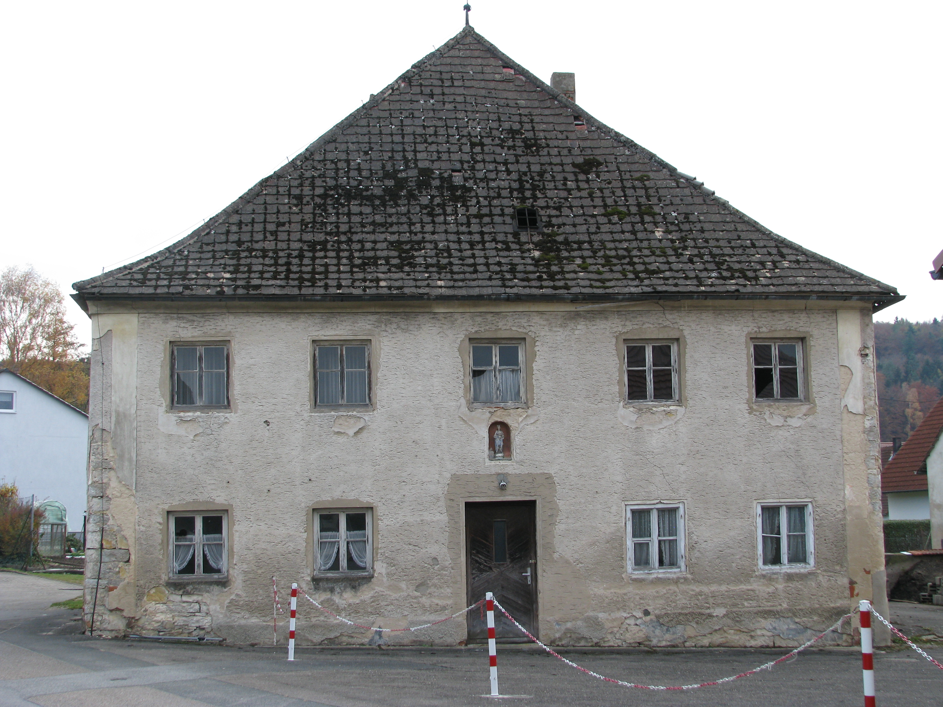 Burggriesbach, Ortsteil von Freystadt im Landkreis Neumarkt in der Oberpfalz in Bayern, ehemalige Dorfmühle